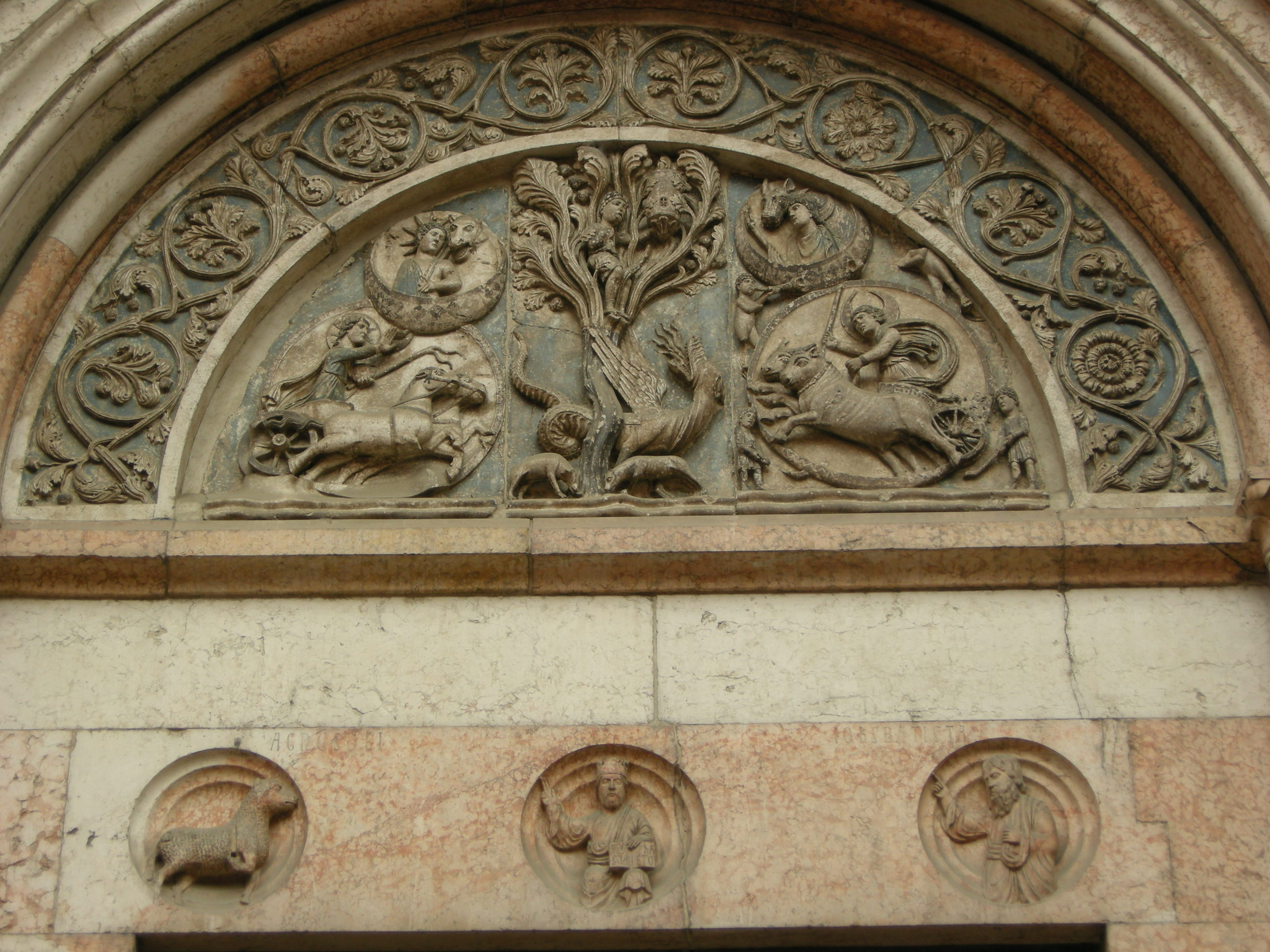 Battistero di parma, portale sud 02 leggenda di barlaam